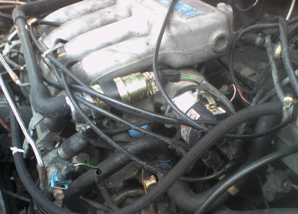 Zu sehen ist der Zusatzluftschieber (oben) und das Kaltstartventil (unten links) eines Golf 2 16V, Autor: Mirko Steiner